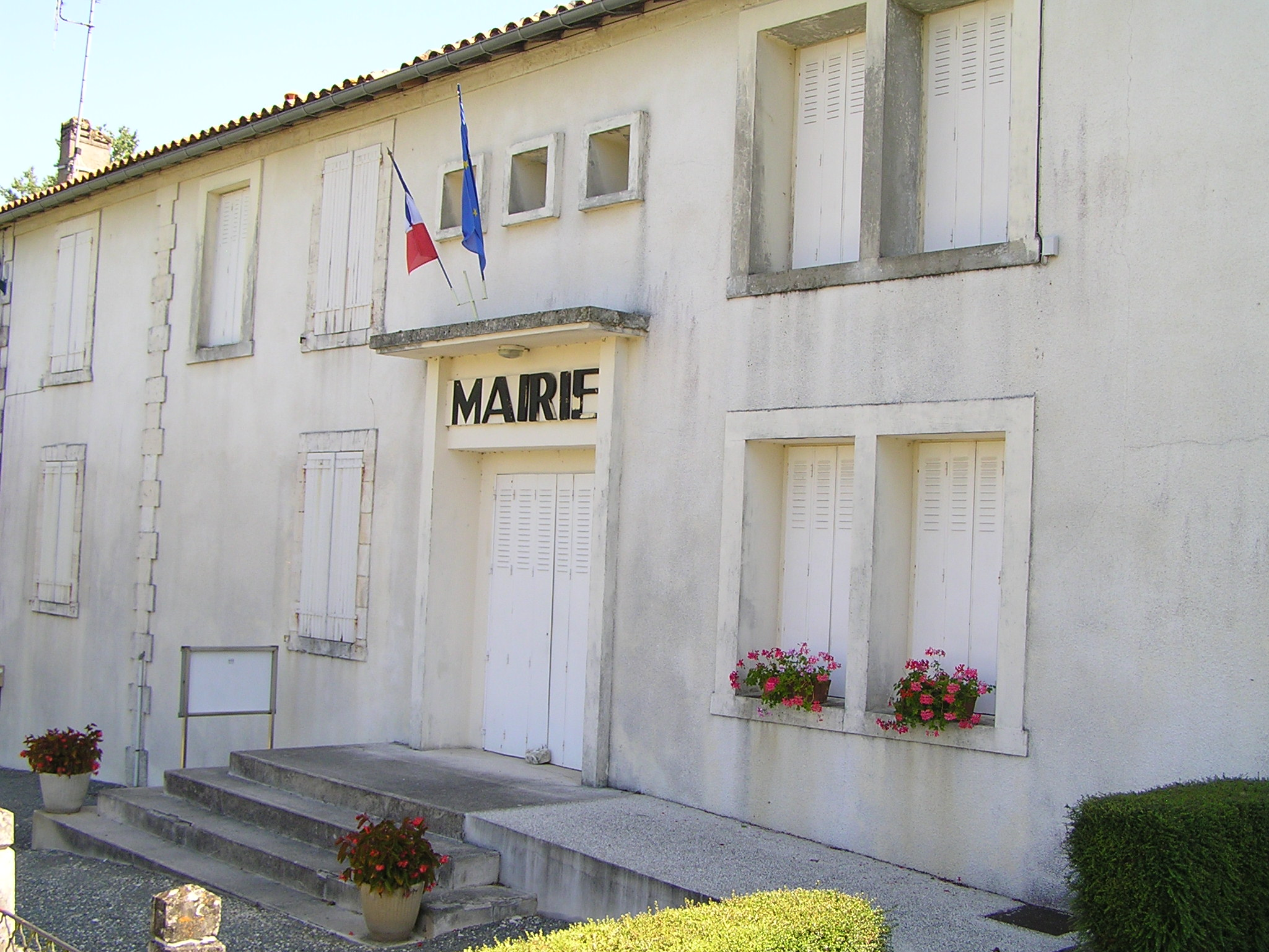 mairie de Bonneuil